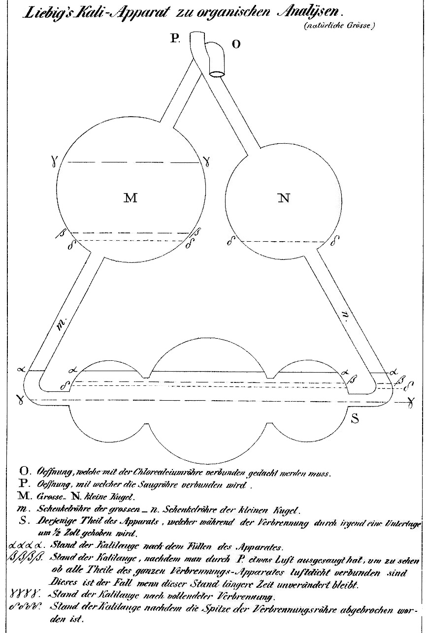 Liebig's Kali-Apparat zu organischen Analysen. Justus Liebig: Anleitung zur Analyse organischer Körper. Verlag Vieweg, Braunschweig, 1837 (1. Aufl.)